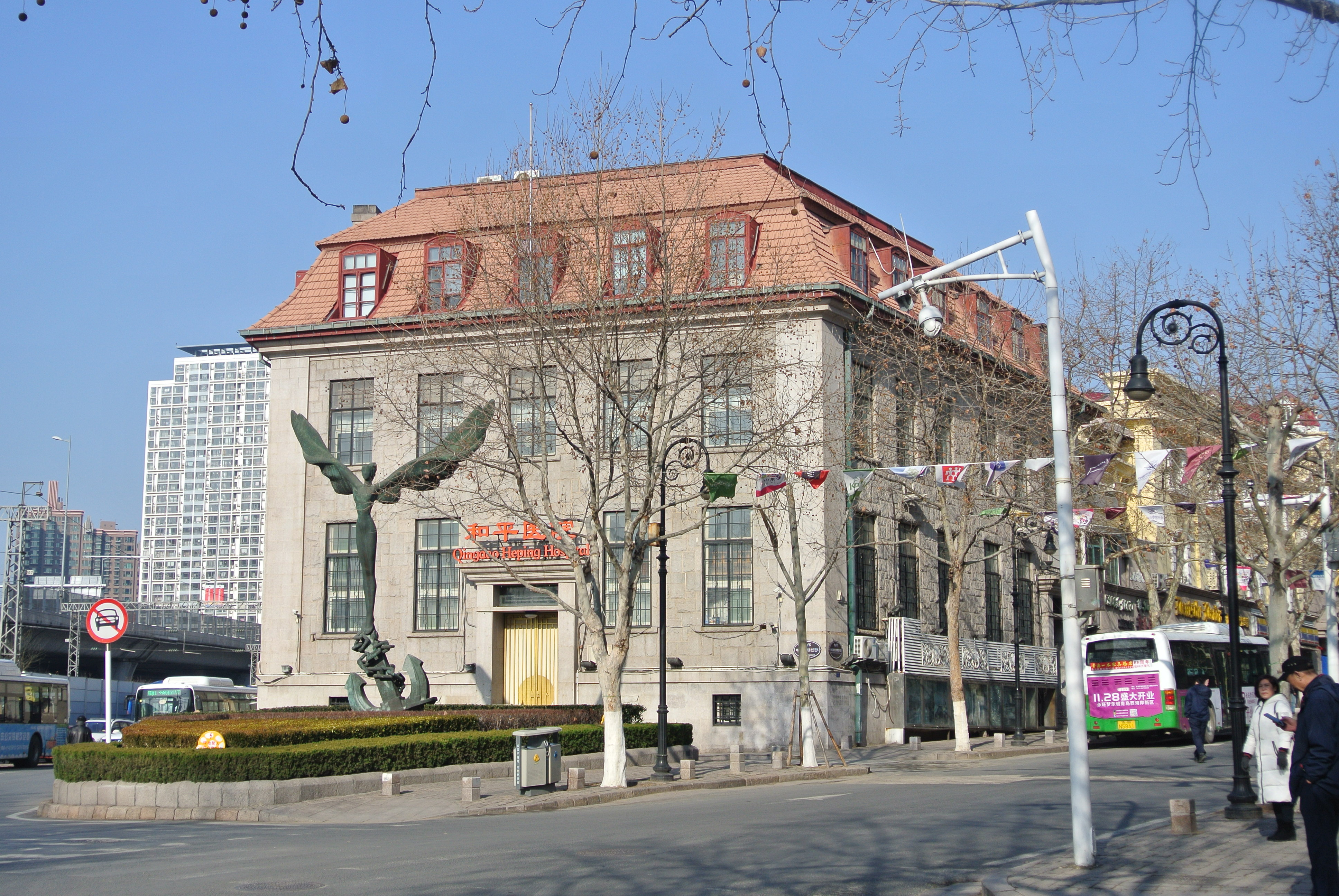 太古洋行青岛分行旧址